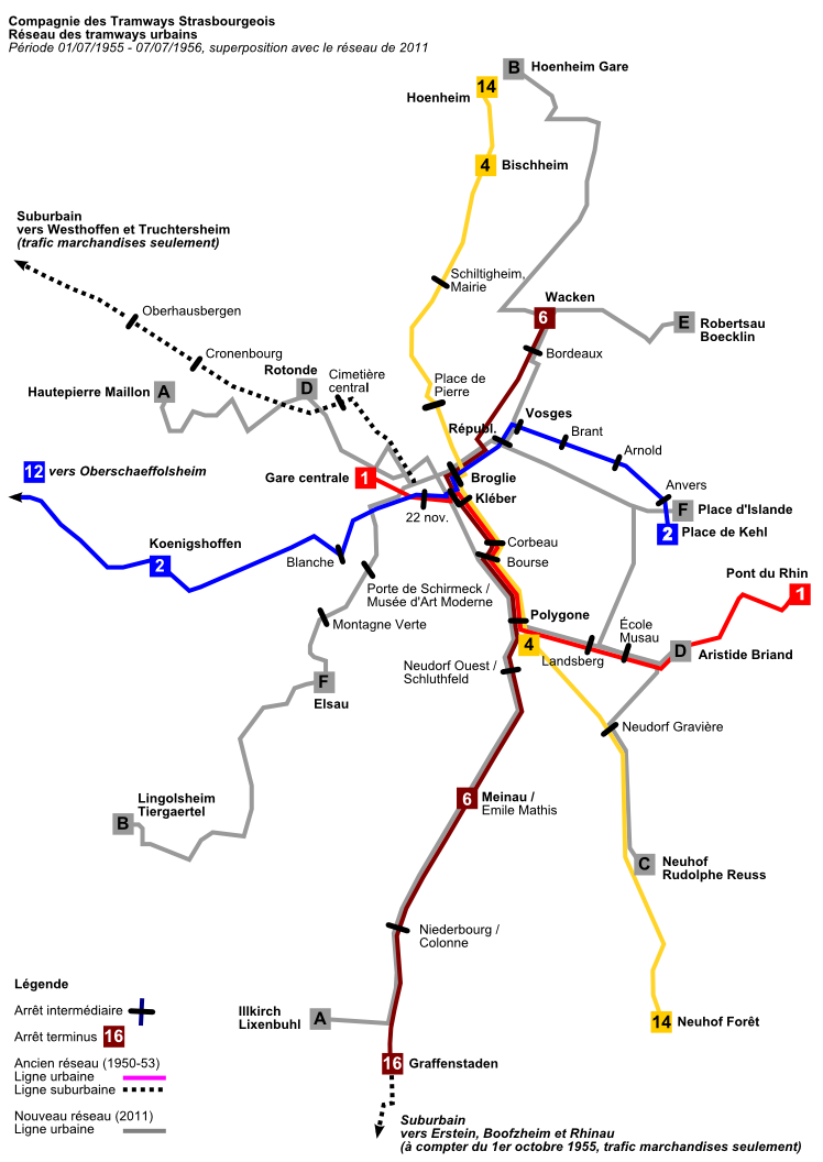 Le réseau des tramways urbains de la CTS après la seconde vague de fermetures de 1954-55. Le réseau reste ensuite stable du 1er juillet 1955 jusqu'au 7 juillet 1956.